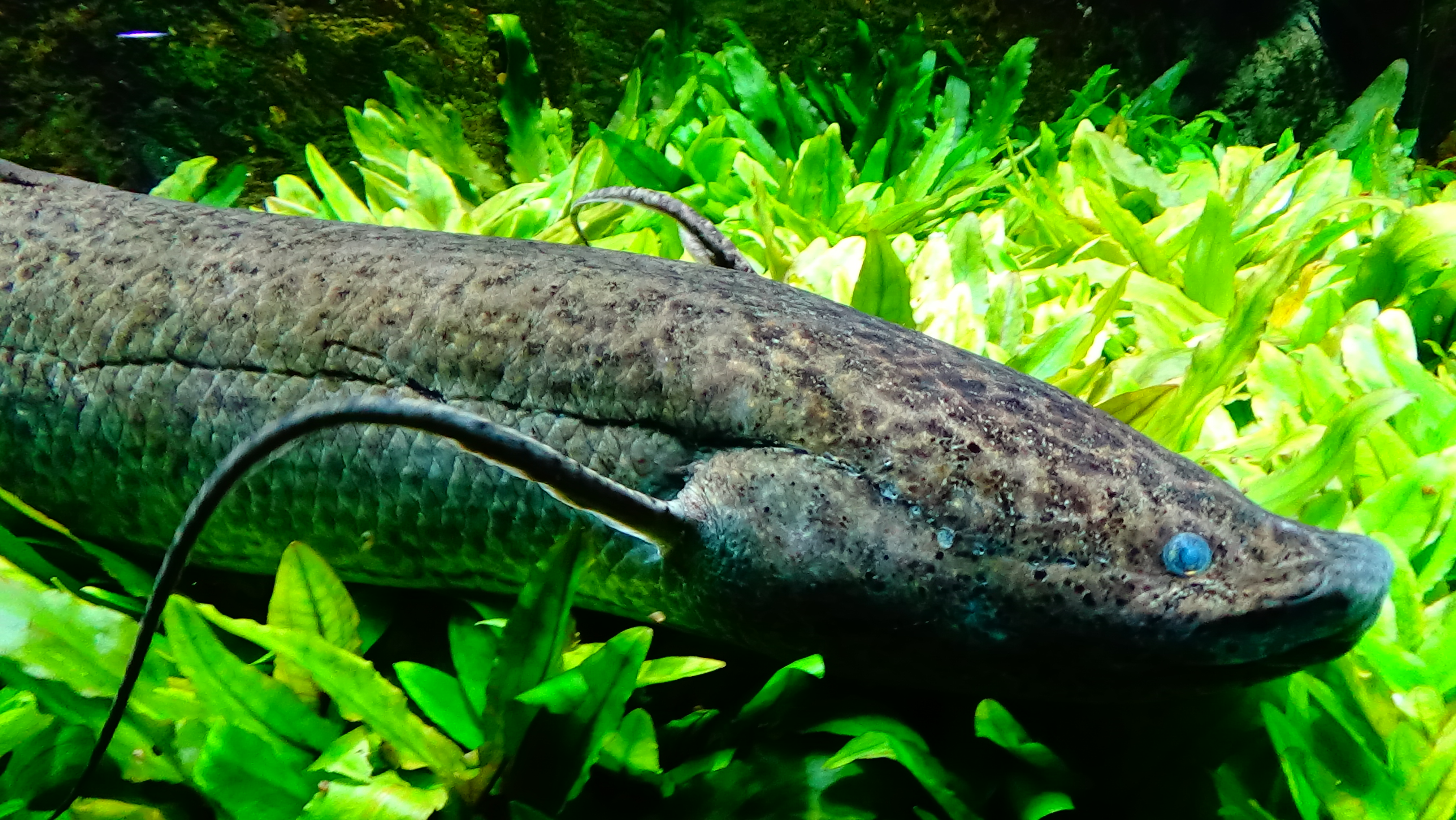 Protopterus annectens - dipneuste africain - Aquarium Tropical du Palais de la Porte Dorée Paris, Ile de France, France - 12/2014